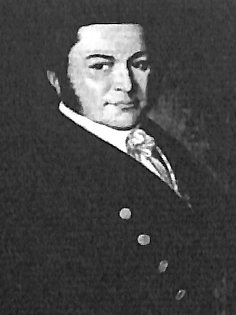 Jean-Antoine Didier Kléber (1788-1863), co-fondateur en 1820 de la papeterie Blanchet Frères et Kléber de Rives (Isère) .